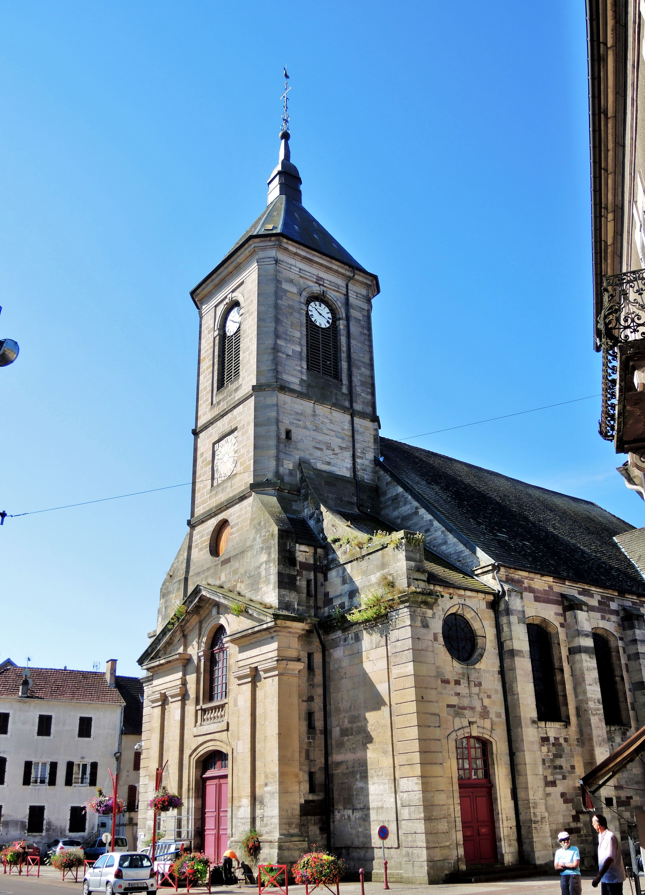 Eglise saint Irénée.